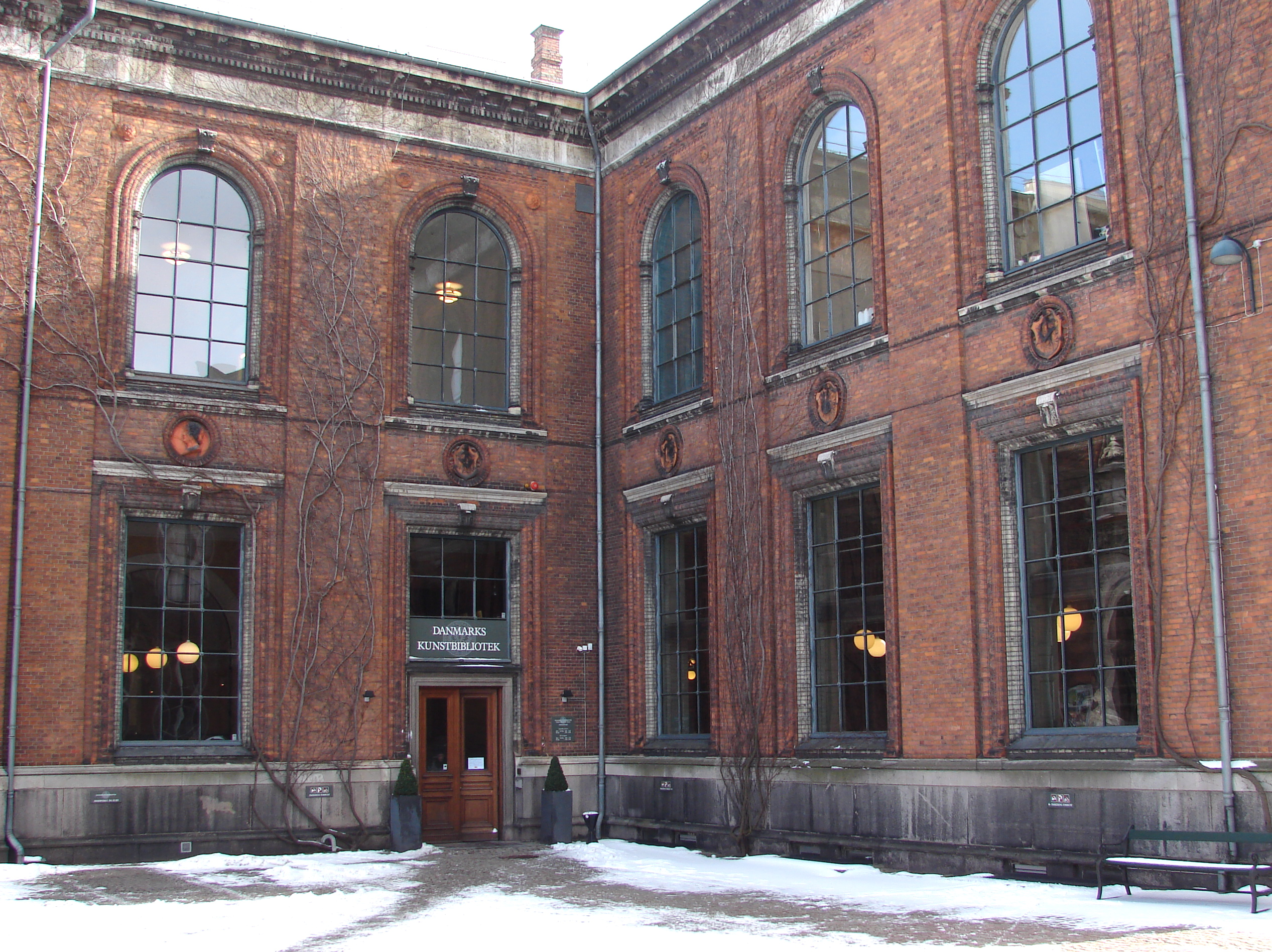 Danmarks Kunstbibliotek ved Charlottenborg, København